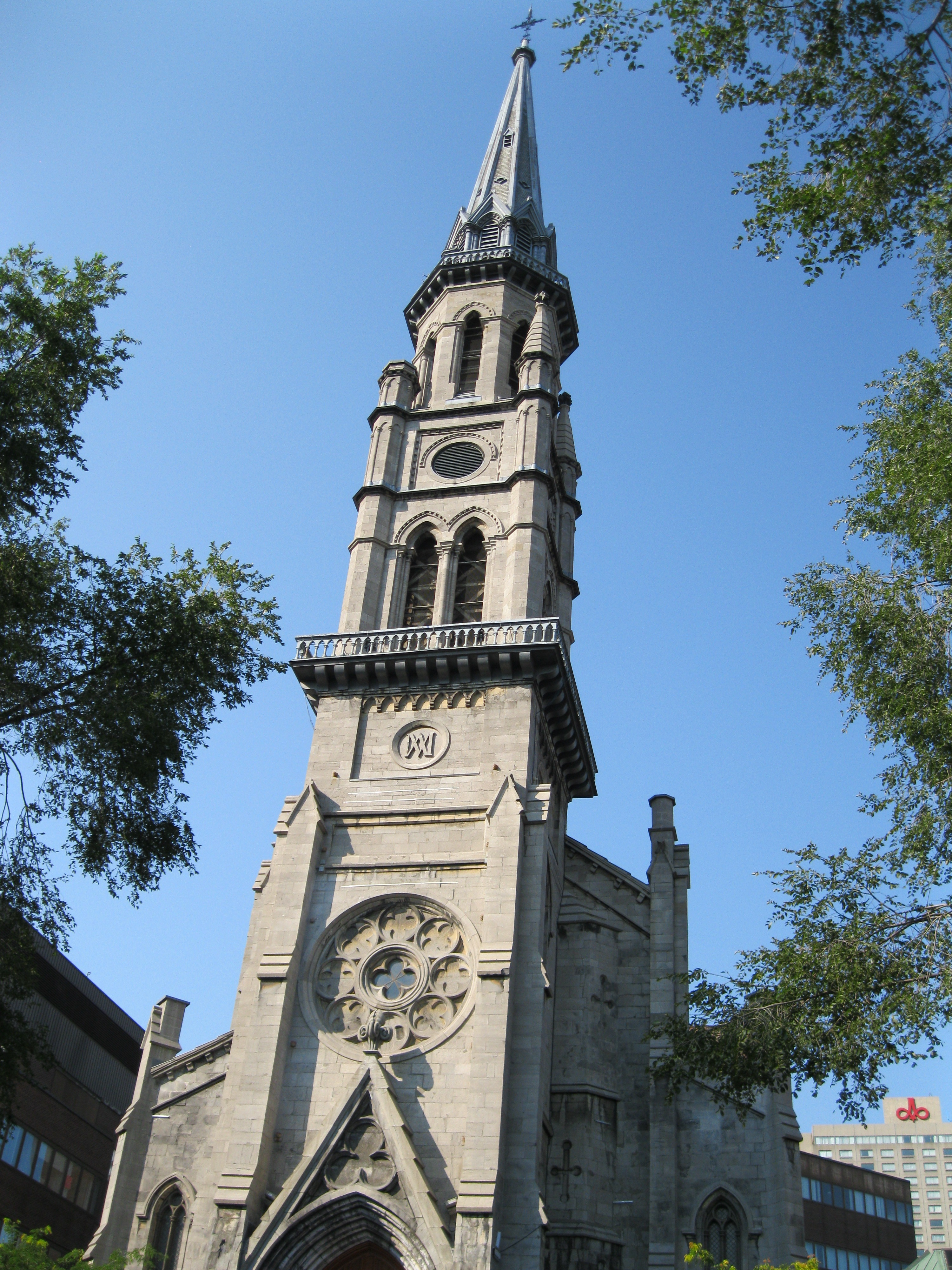 Clocher de l'ancienne église Saint-Jacques le Majeur intégrée au pavillon Judith-Jasmin de l'Université du Québec à Montréal (UQAM).